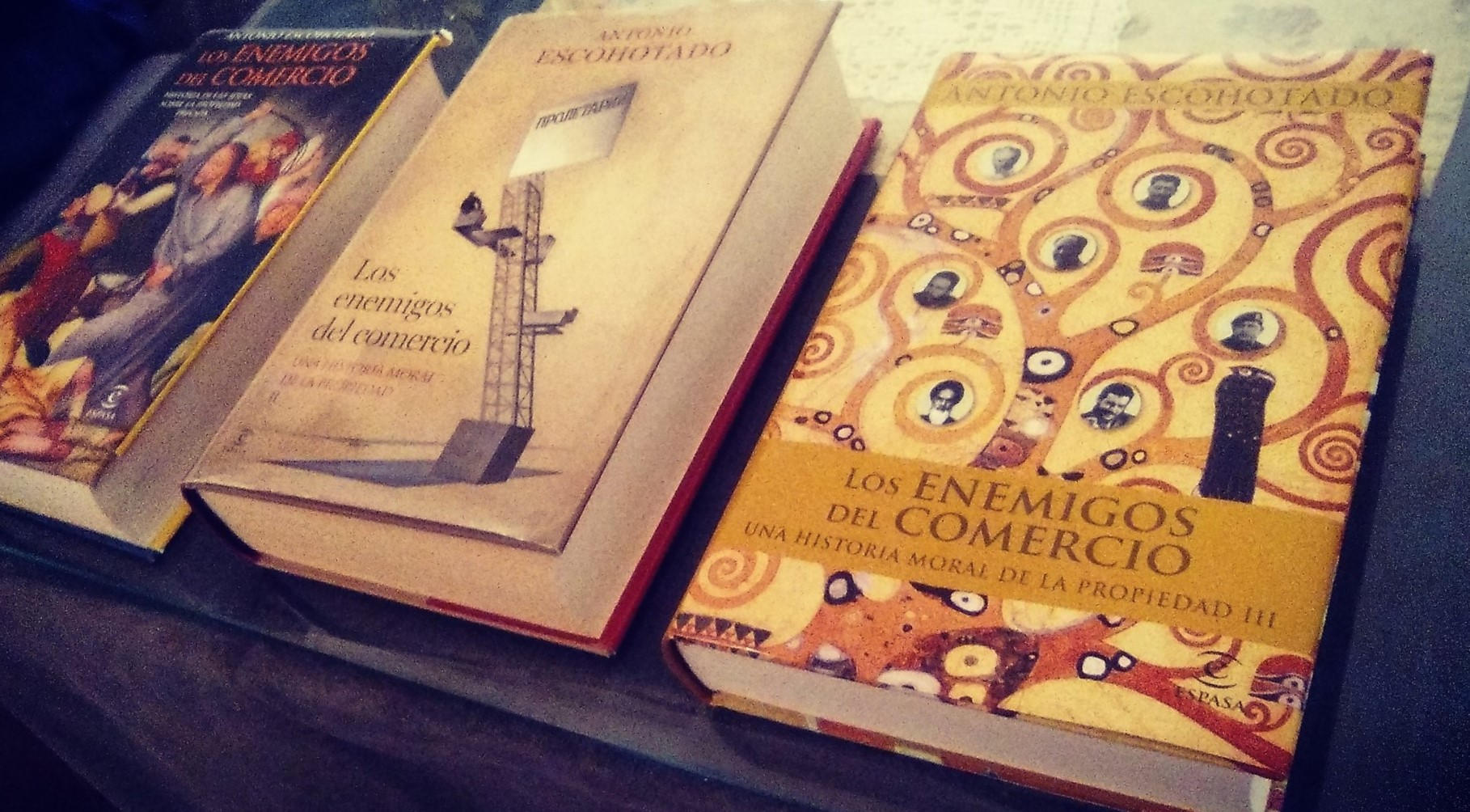 Obra sin parangón dentro de la investigación del movimiento comunista. En la imagen, los tres volúmenes.